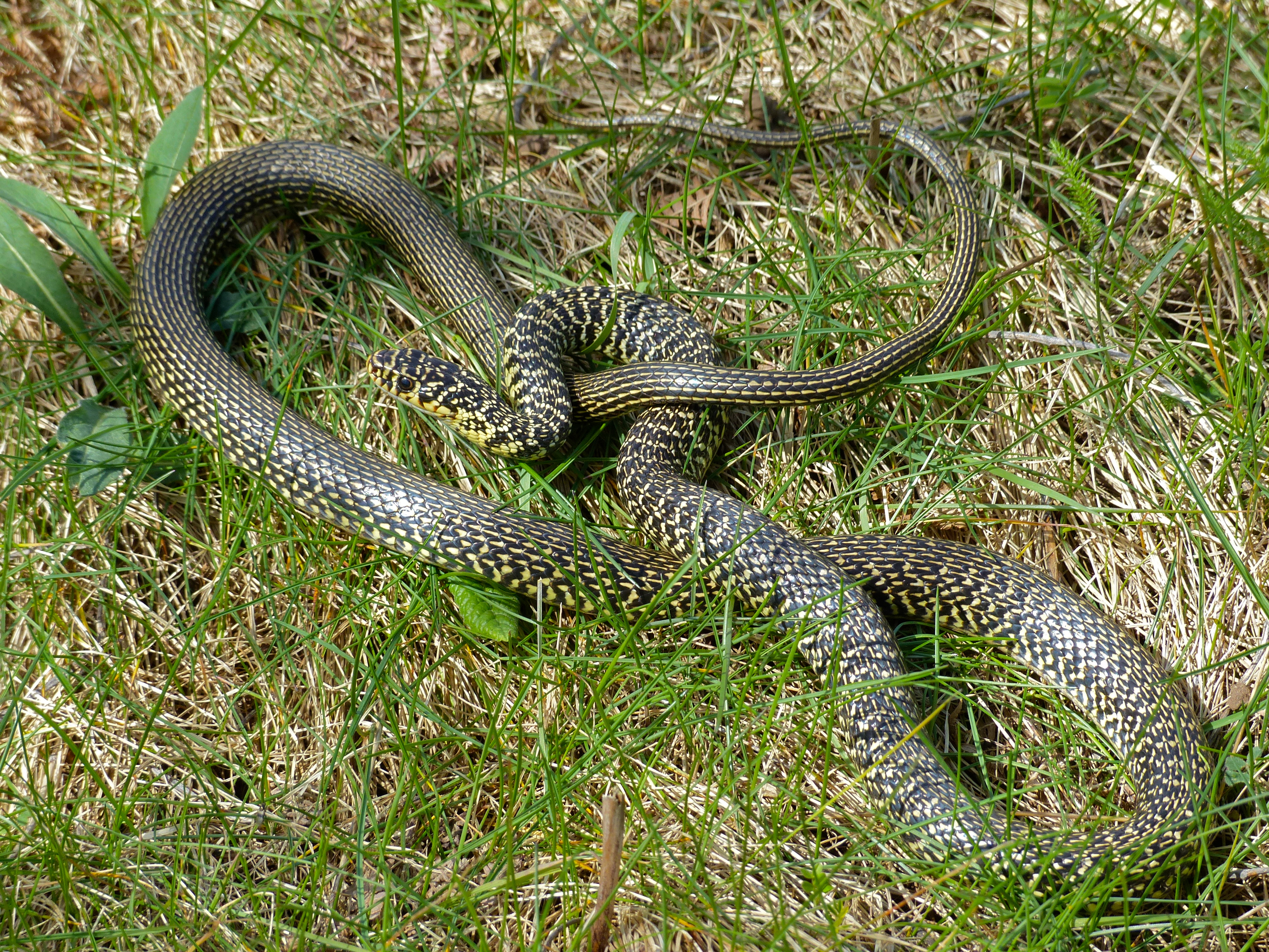 Les Rives, Hérault, FRANCE